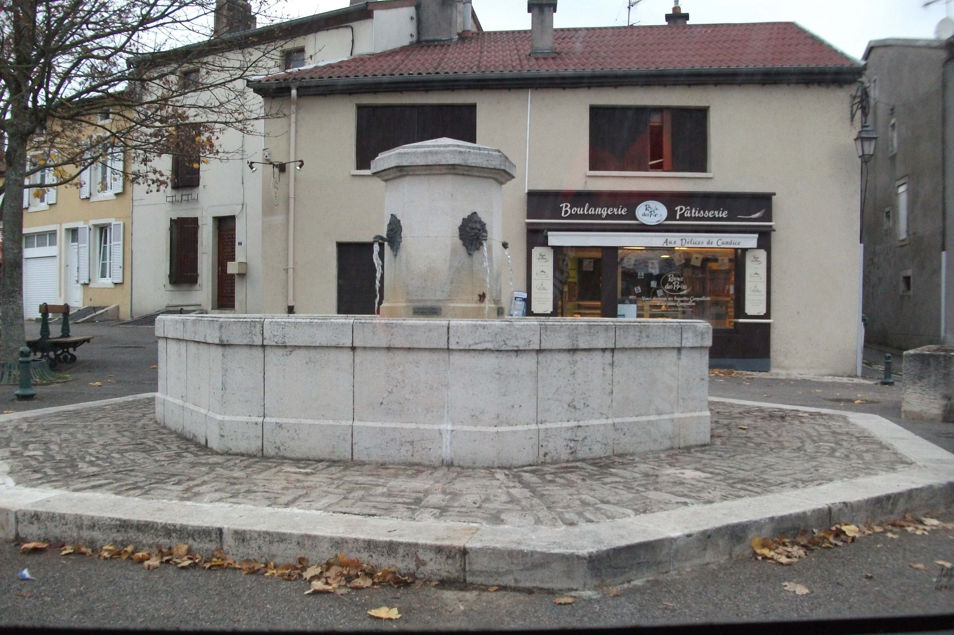 place de la fontaine de Gondreville.